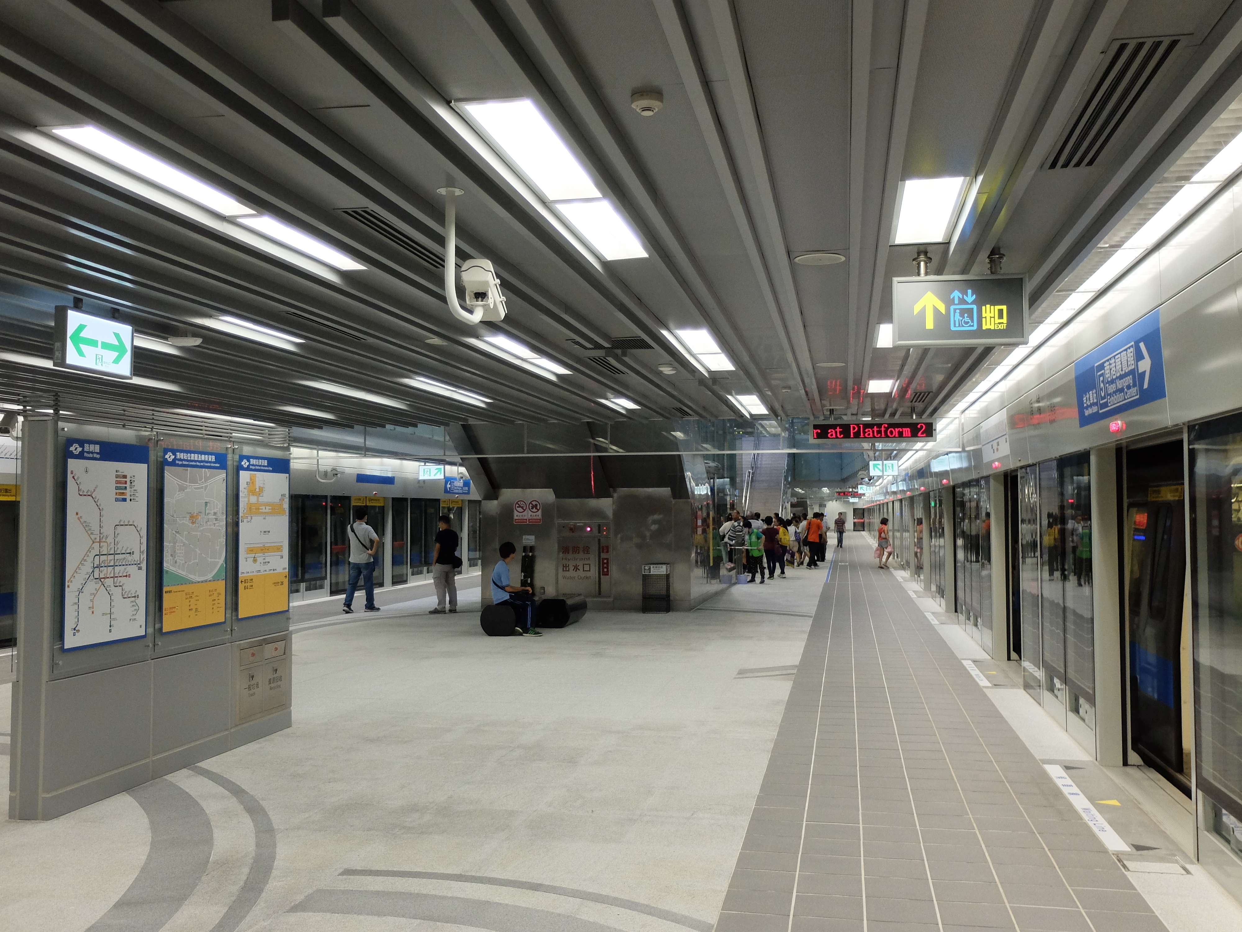 台北捷運頂埔站的月台層。